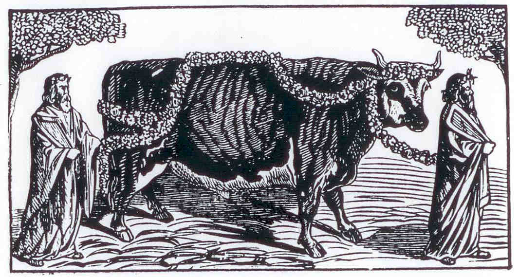 Gravure sur bois en-tête du Programme du cortège, de l'ordre et de la marche du Bœuf Gras 1854 (gravure réutilisée par la suite d'autres années).